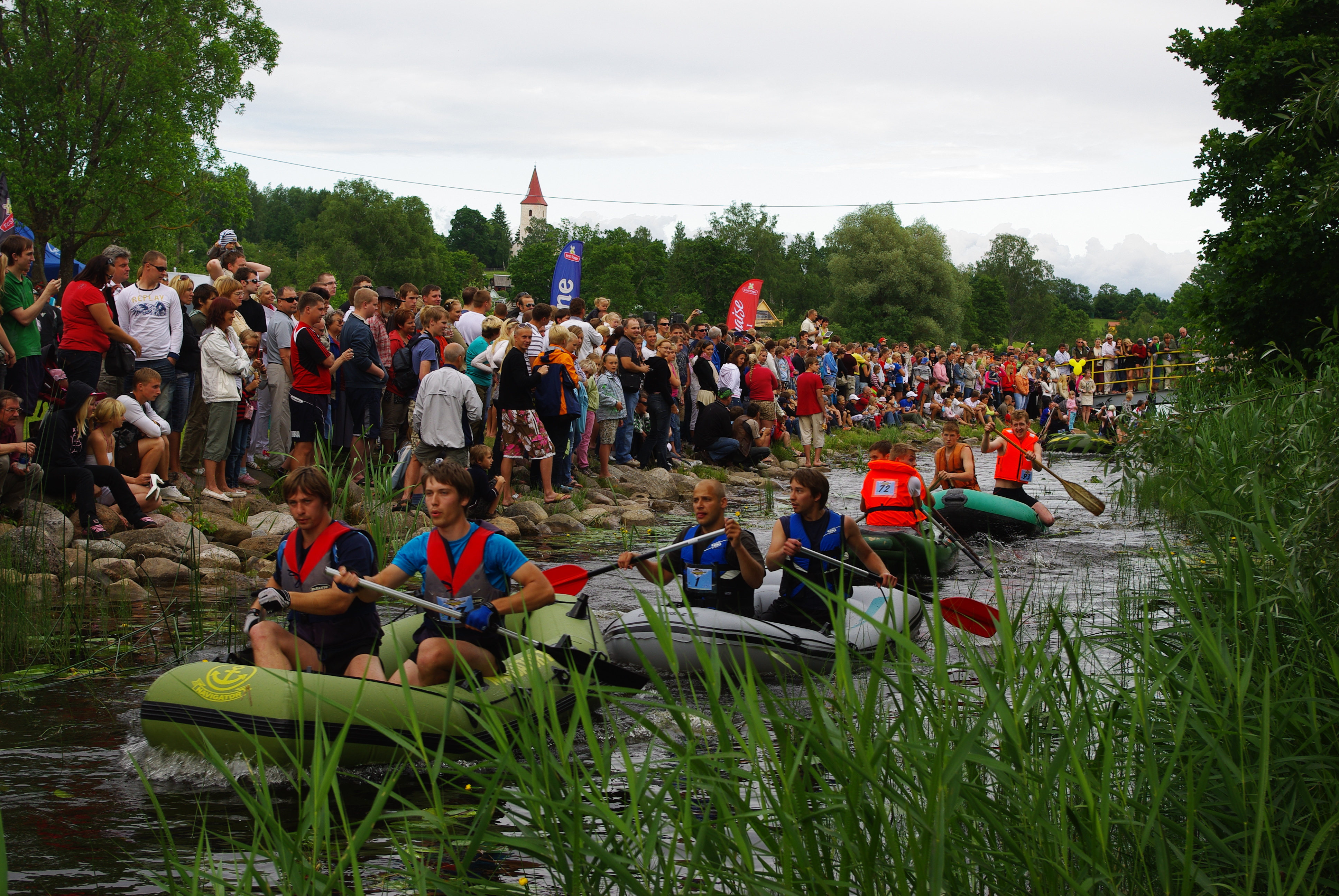 Rõuge Veepidu ja Paadiralli